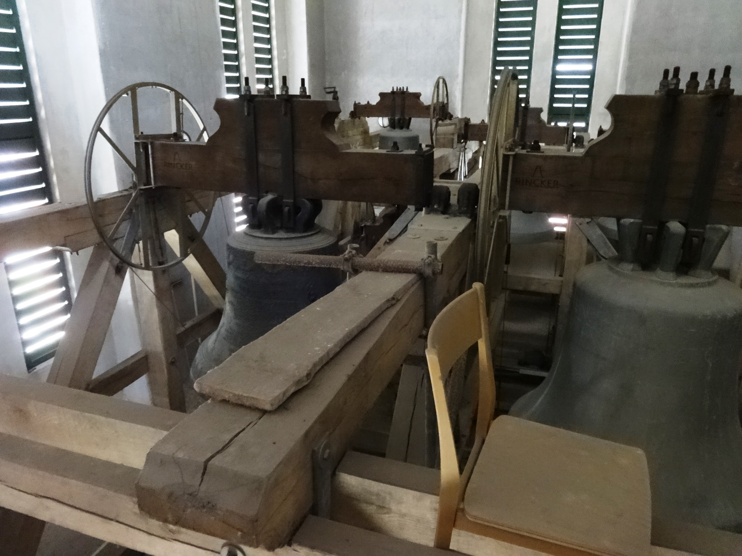 Marienkirche in Pasewalk, Mecklenburg-Vorpommern